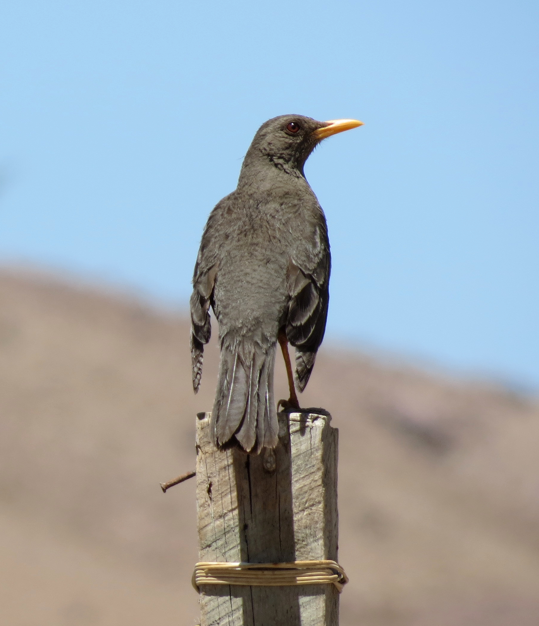 Turdus chiguanco subespecie chiguanco Coscaya, Región Tarapacá